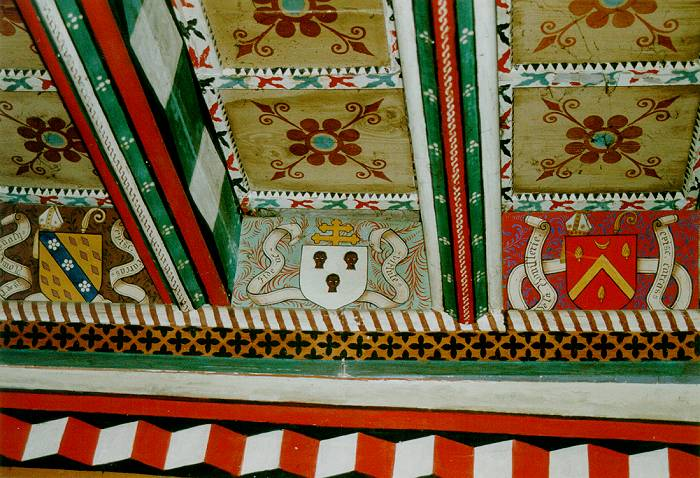 Armoiries de Mgr de Bonnechose, évêque de Carcassonne de 1848 à 1855, peintes dans une salle du cloître de l'abbaye de Saint-Hilaire (Aude) ayant servi de logis abbatial au XIXè siècle. Restauré vers 1860.